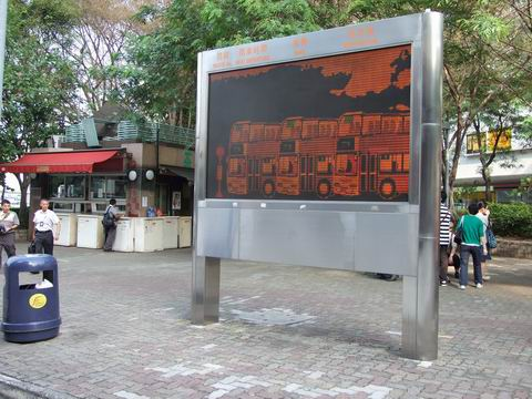 位於上水廣場巴士總站的電腦螢幕